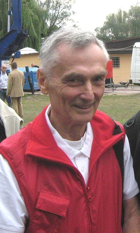 Wojciech Zabłocki (ur. 6 grudnia 1930 w Warszawie) – polski architekt, szermierz (olimpijczyk)